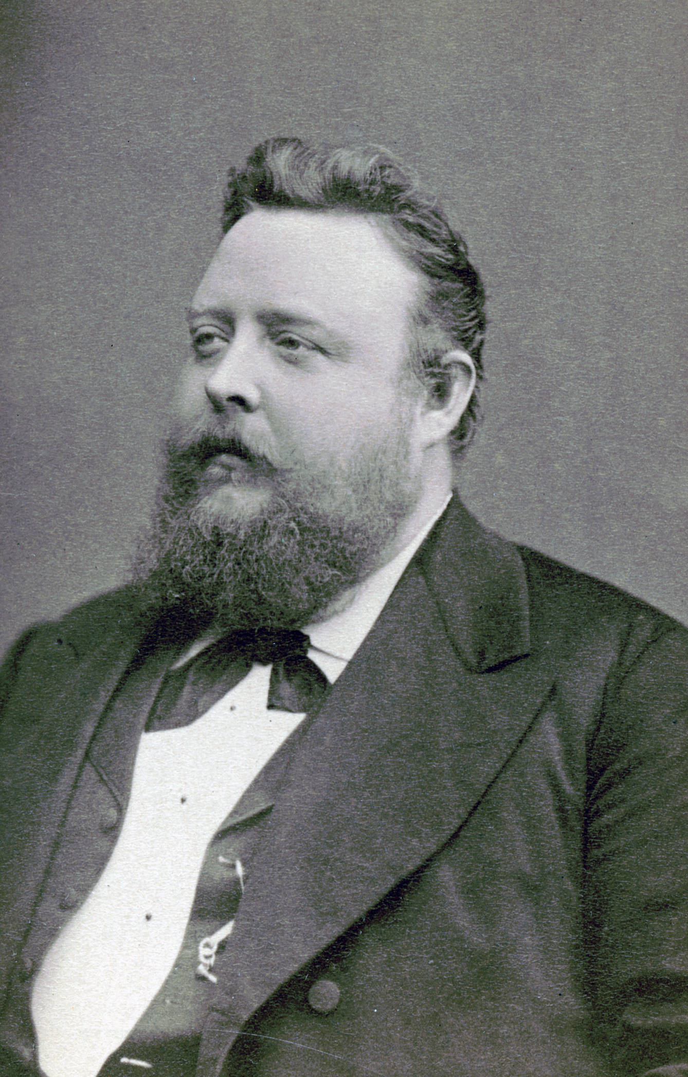 Carl Fredrik "Lunkan" Lundqvist, sångare vid Kungliga Operan 1877